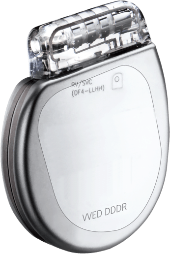 ICD